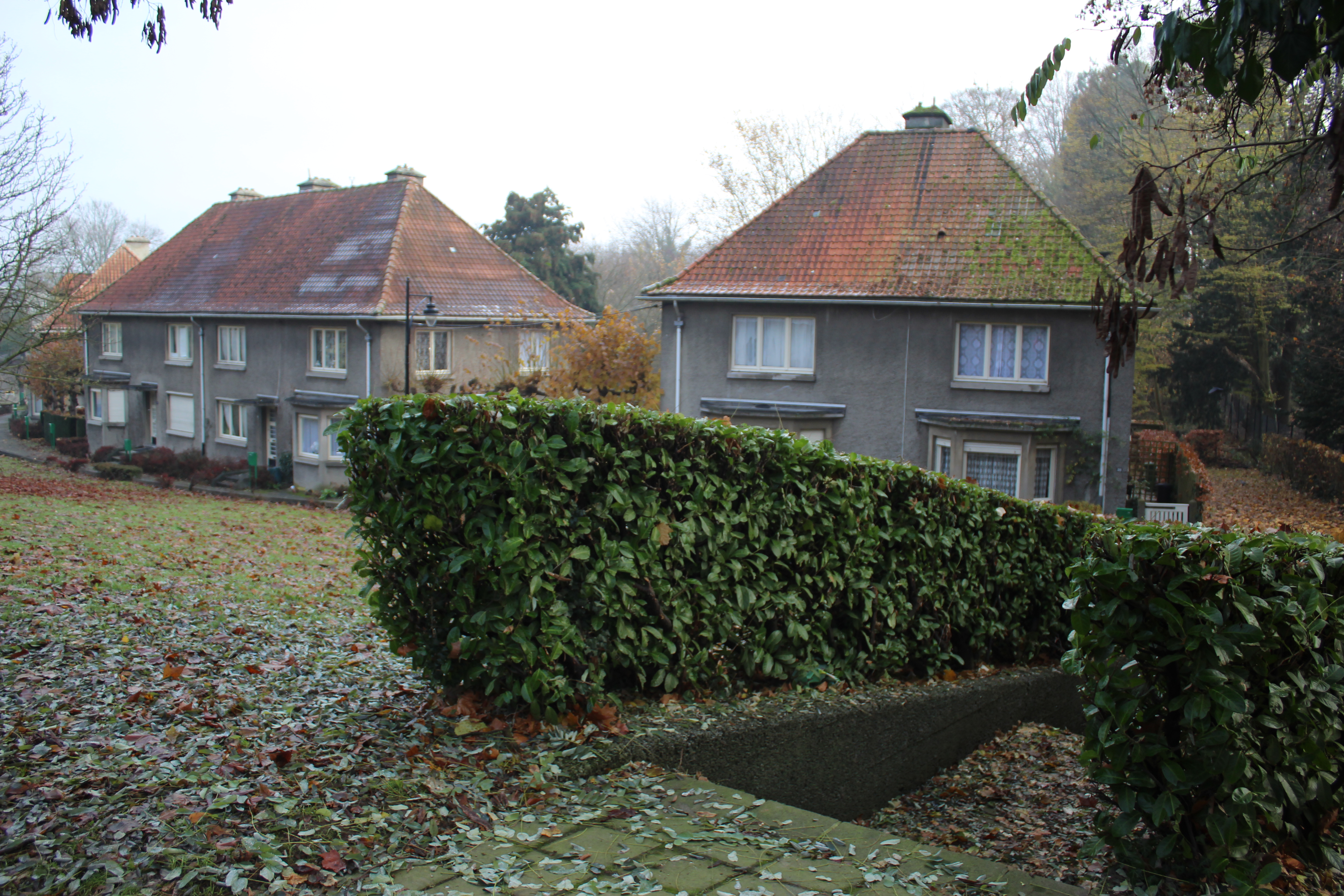 Casas en medio de jardines en el municipio Belga de Watermael-Boitsfort